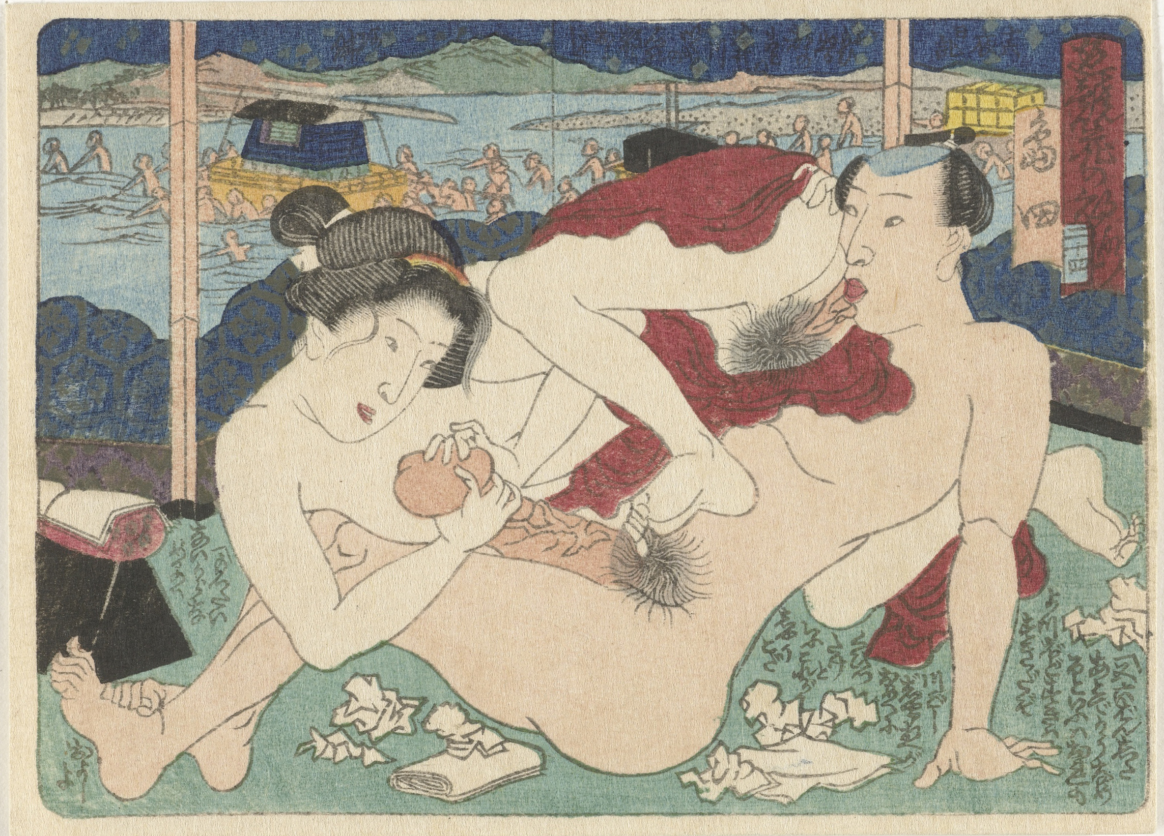 Man en vrouw de liefde bedrijvend in kamer met uitzicht op rivier waarin zwemmende kruiers; op de voorgrond verfrommelde tissues. Label Line: Kunisada (I) , Utagawa (1786 - 1865), 1835 - 1845, kleurenhoutsnede; lijnblok in zwart met kleurblokken Collection: prenten; Japan (collectie)